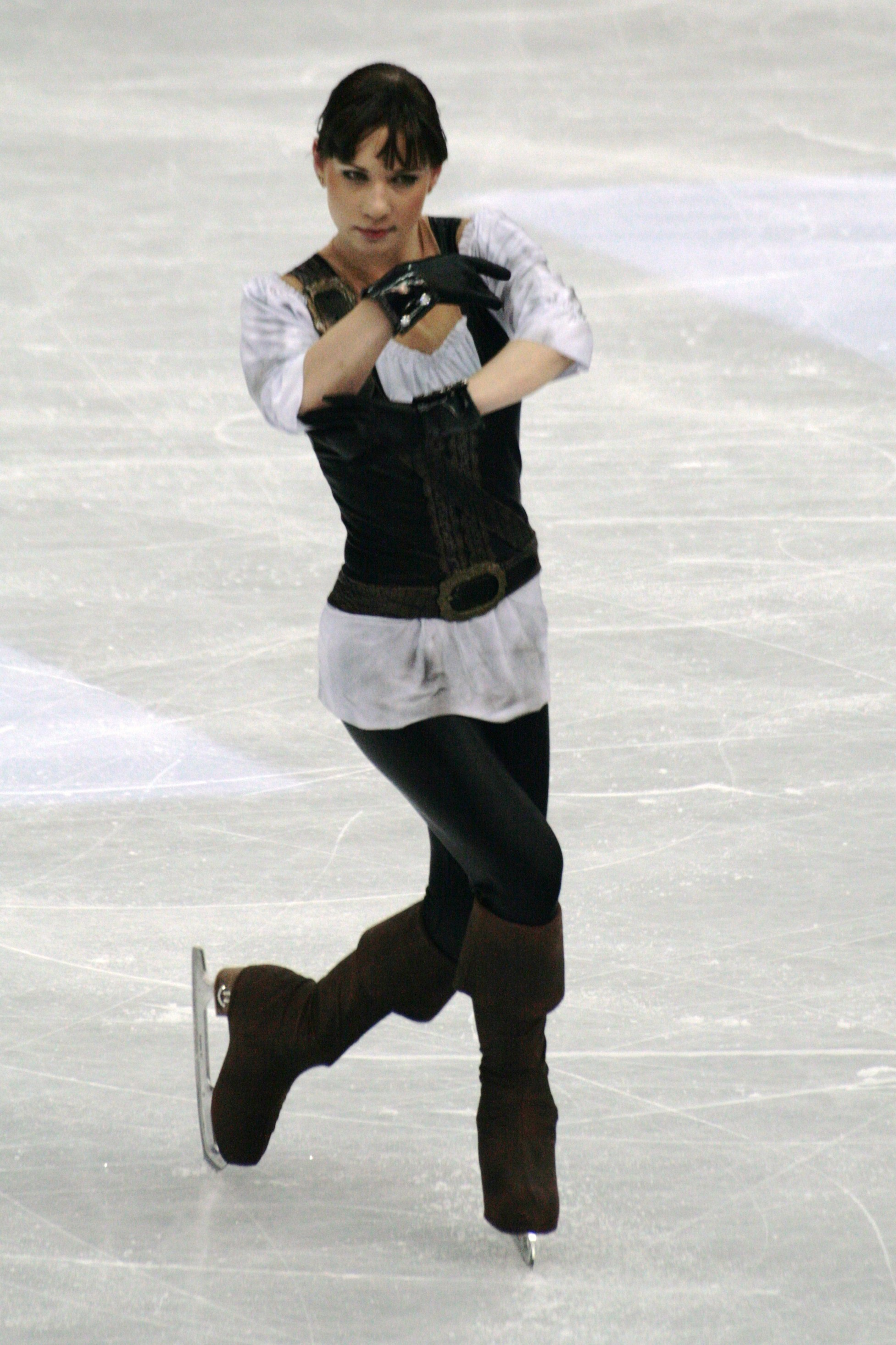 Алена Леонова (Россия) на чемпионате мира по фигурному катанию 2012